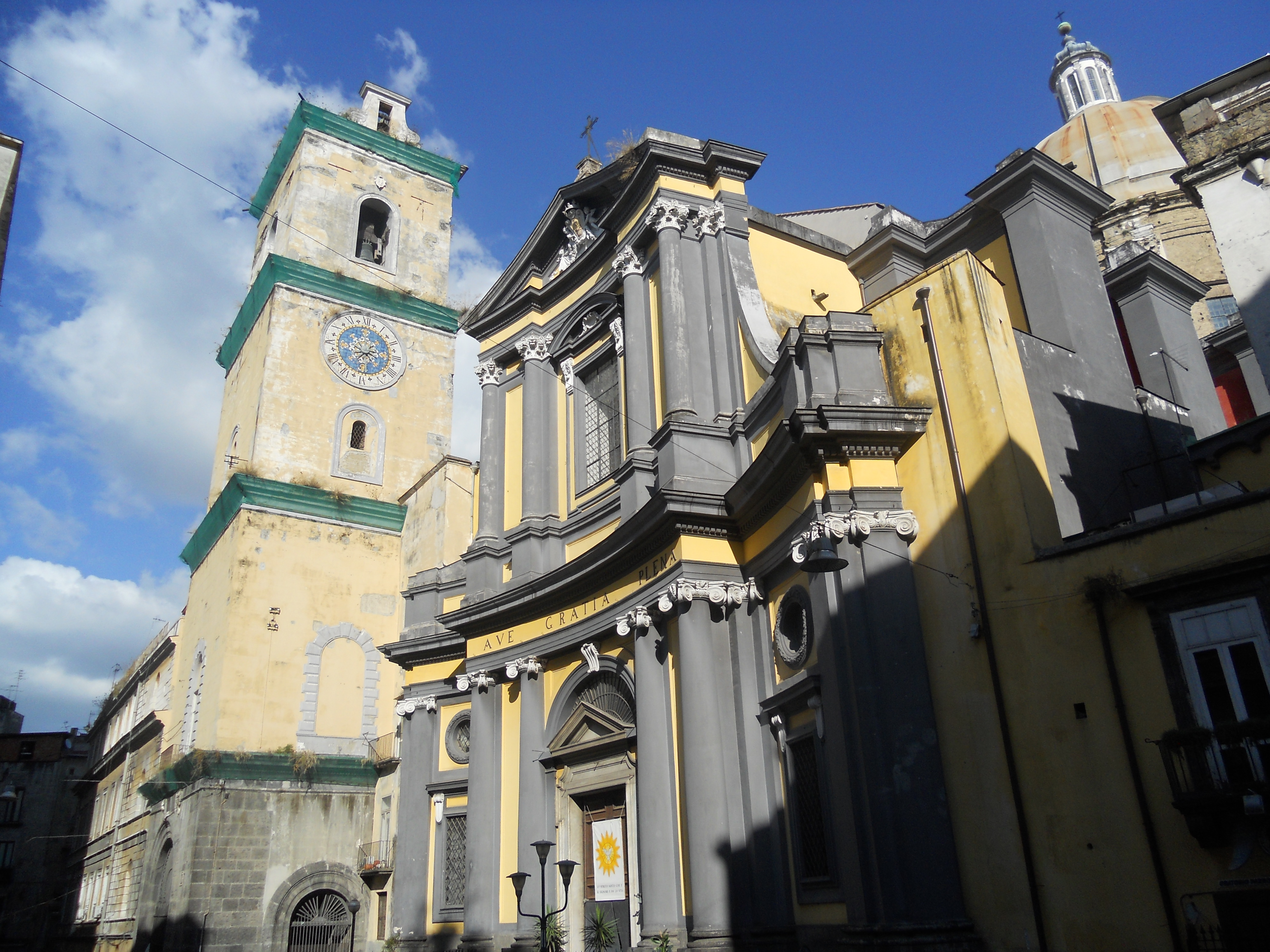 Basilica della Santissima Annunziata Maggiore (Napoli)